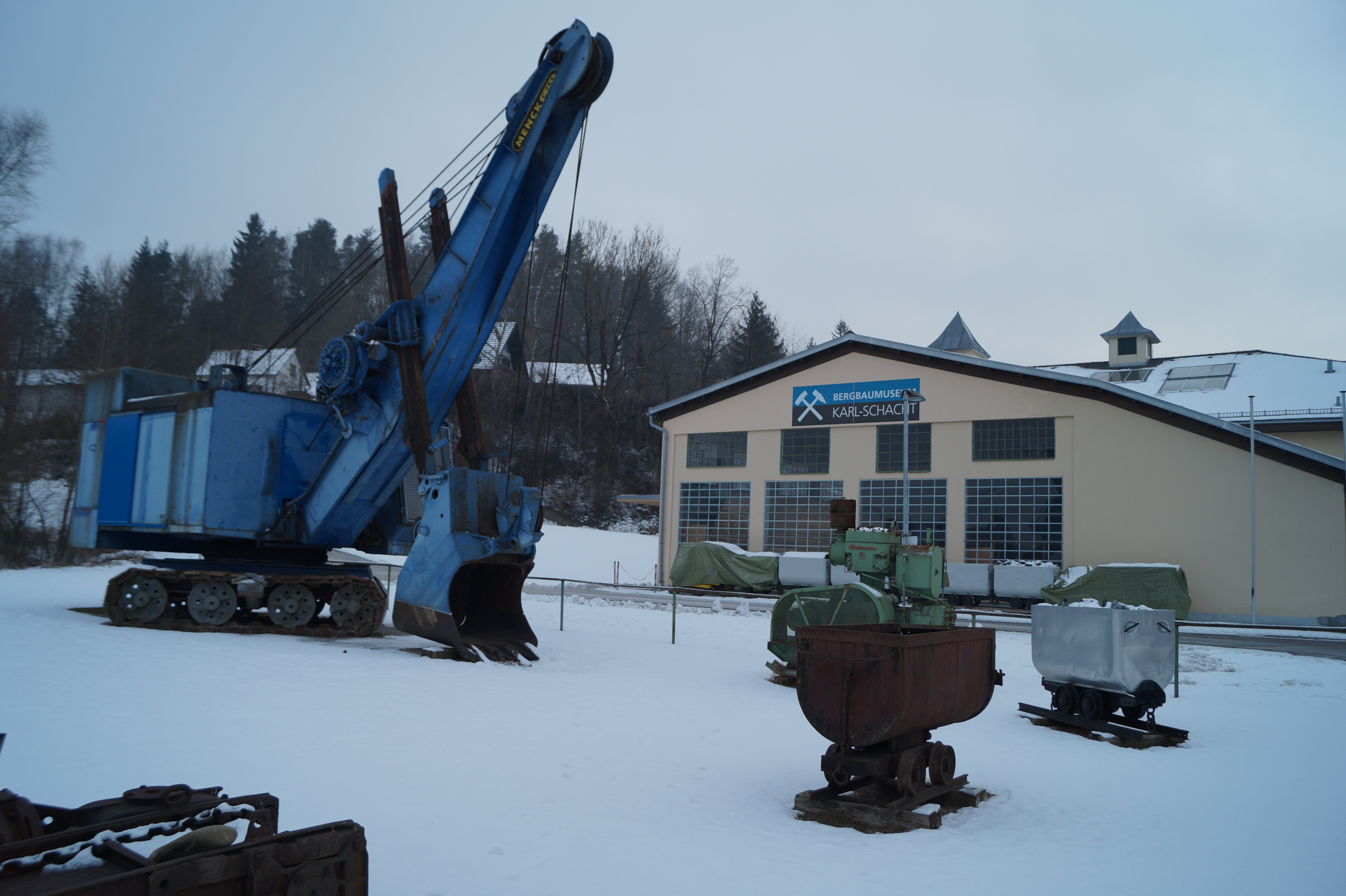 Im Jahr 2010 hat die Gemeinde Rosental an der Kainach im Bereich des ehemaligen „Schachthauses“ der Kohlengrube „Karl-Schacht III“ ein Bergbaumuseum eingerichtet, das am 14. Mai 2011 feierlich eröffnet wurde. Dieses zeigt auf einer Fläche von rund 300 m² sowie auf einem angrenzenden Freigelände die wechselvolle Geschichte des weststeirischen Kohlebergbaus.